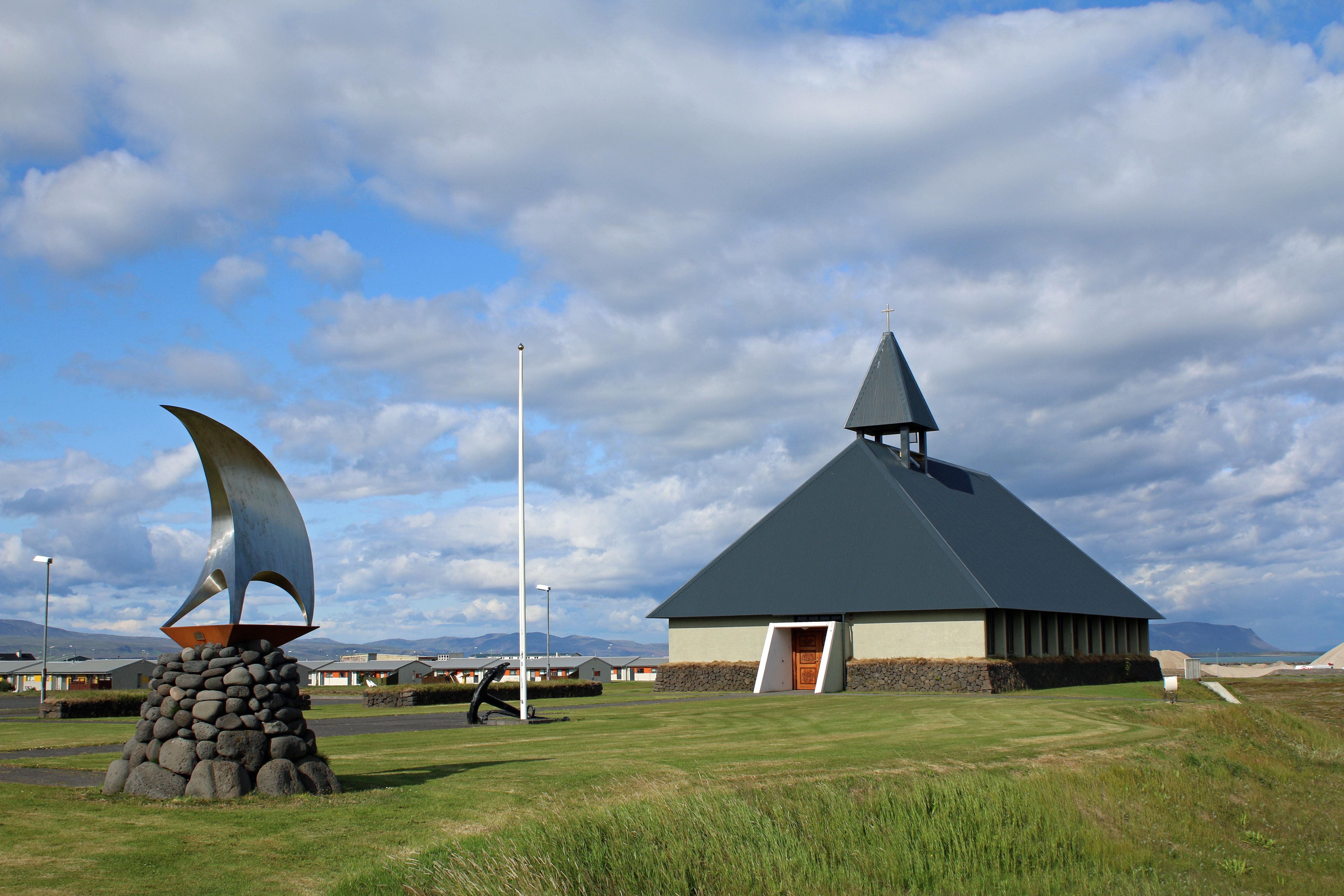 Þorlákshafnarkirkja er í Þorlákshafnarprestakalli í Árnesprófastsdæmi. Þorlákskirkja var vígð 1982